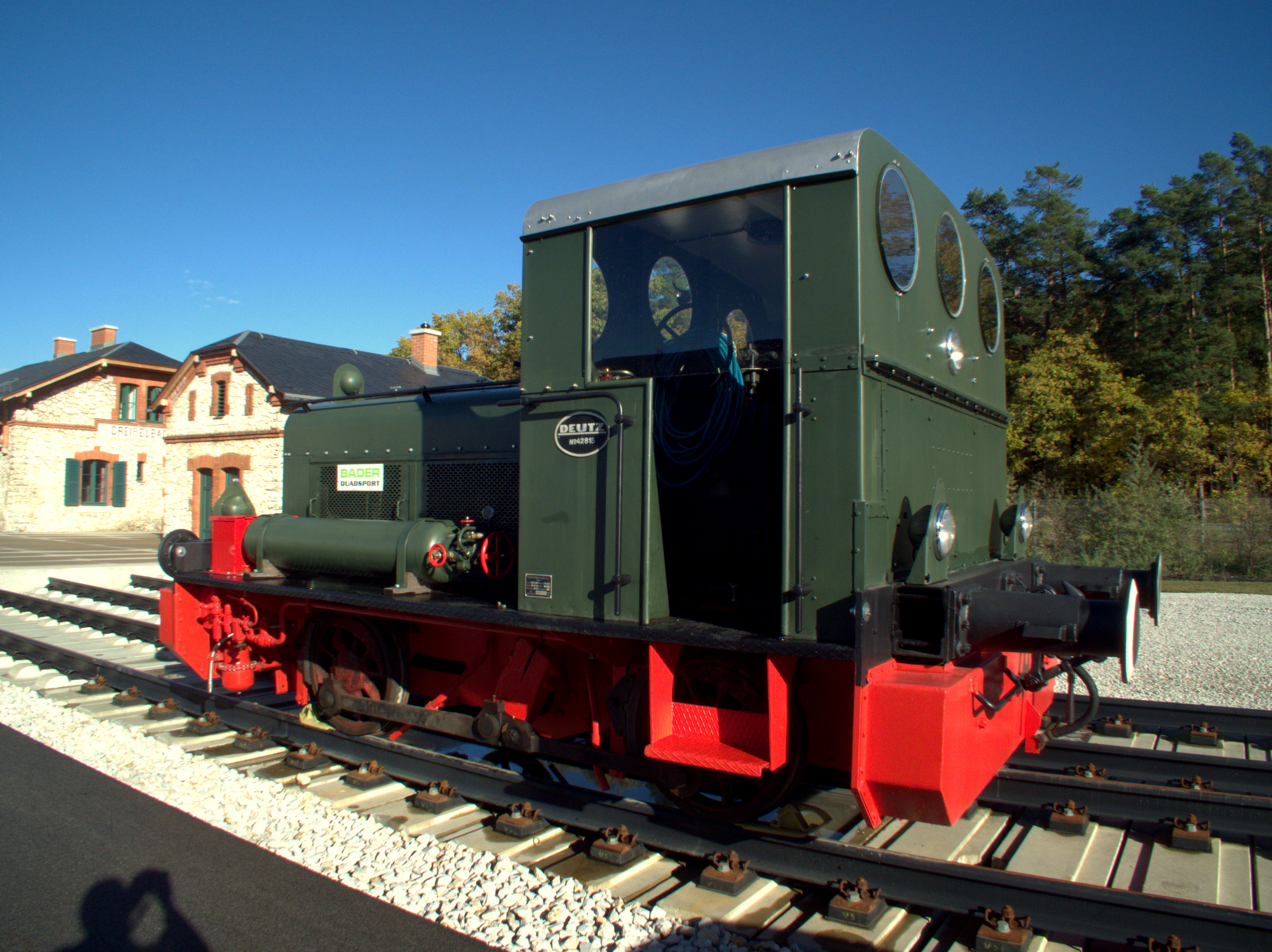 Ehemalige Rangierlok Deutz für die Neumarkter WASAG-Sprengstoffwerke:Typ A3M 420R Seriennummer 42815